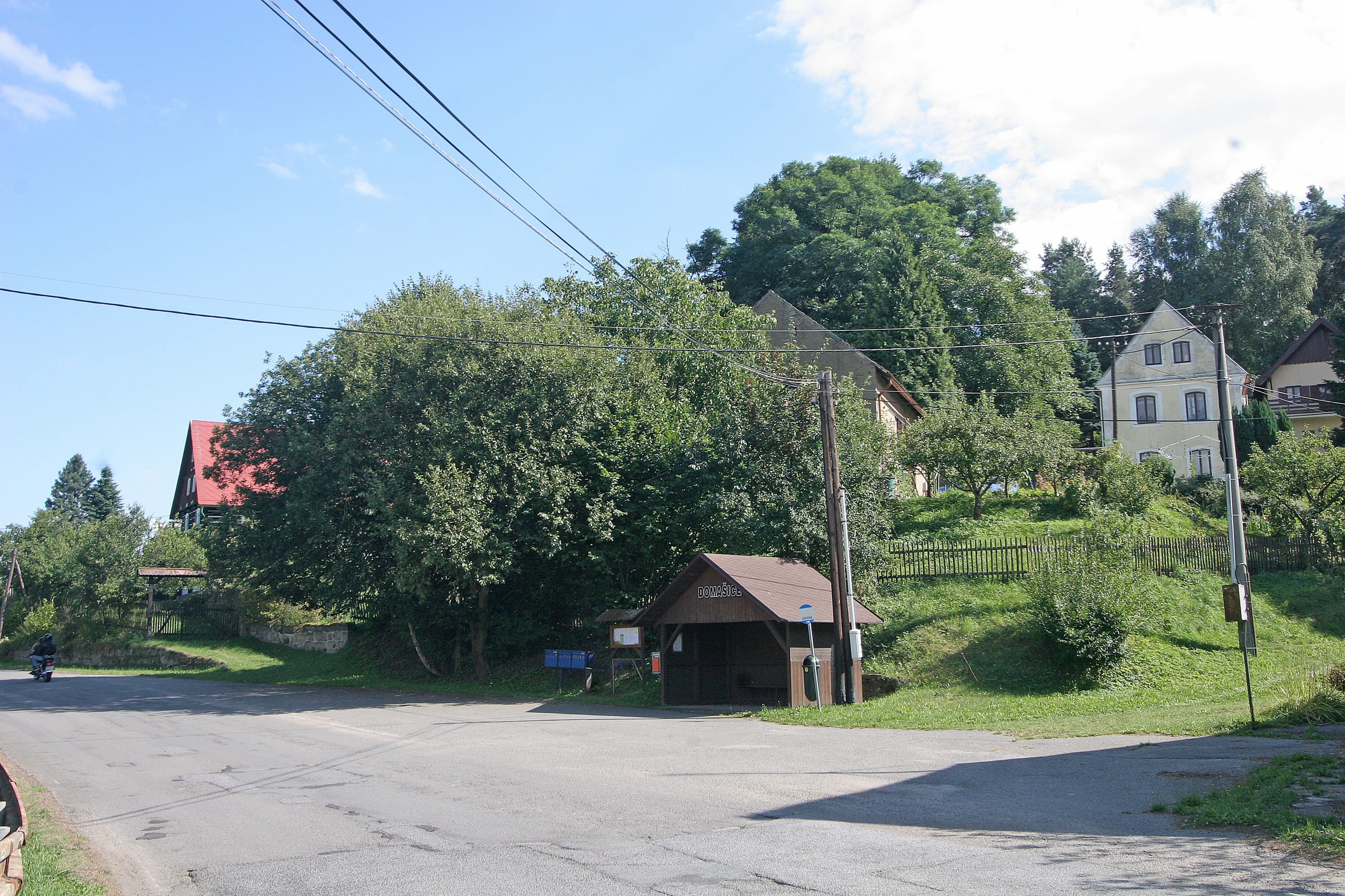 Domašice zastávka